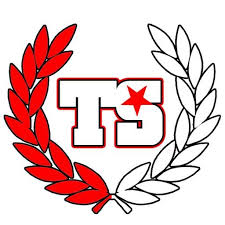 Znak